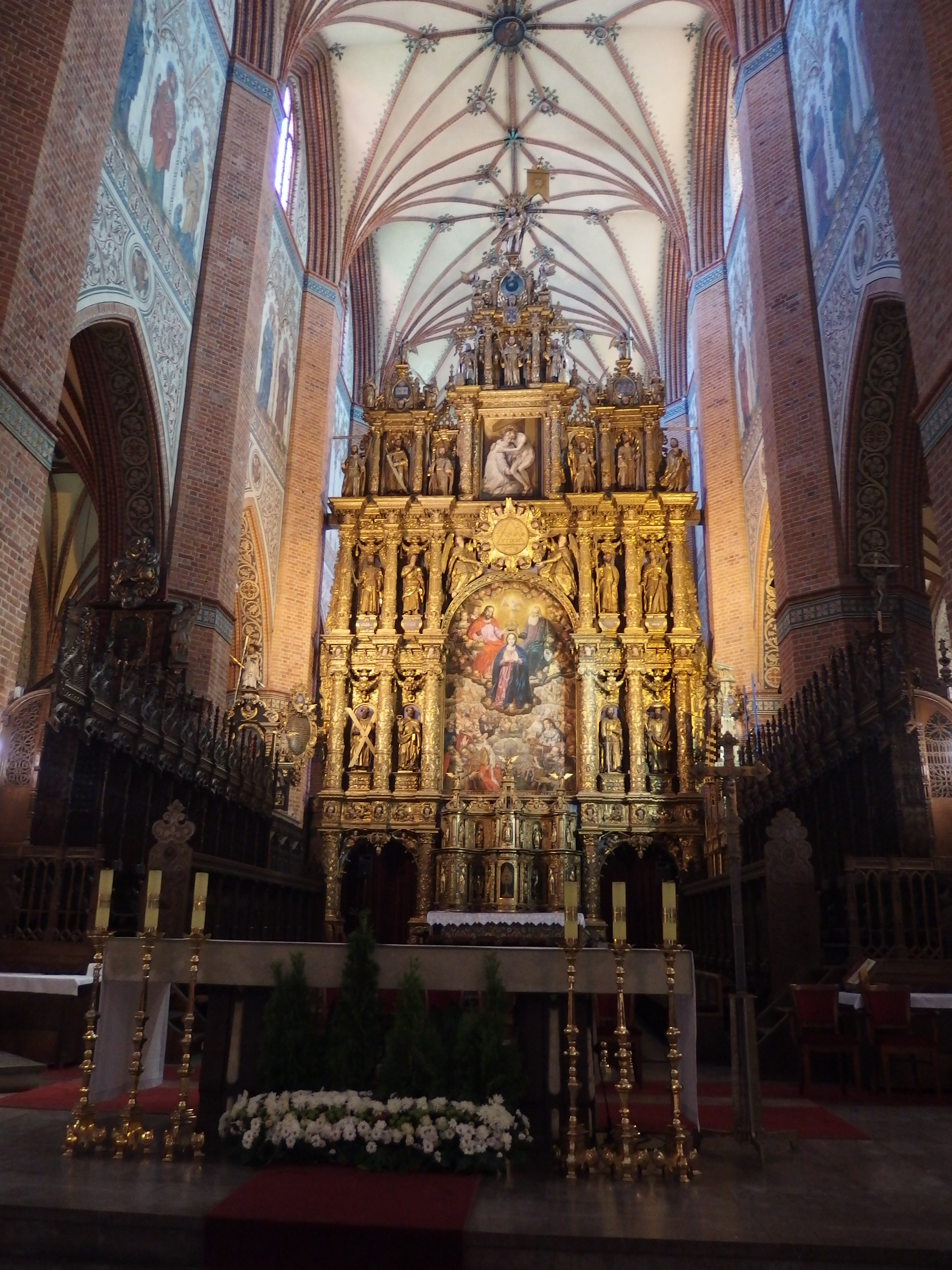 Pelplin, kościół, ob. katedra p.w. NMP, 1280-1350, 1557, 1894-1899